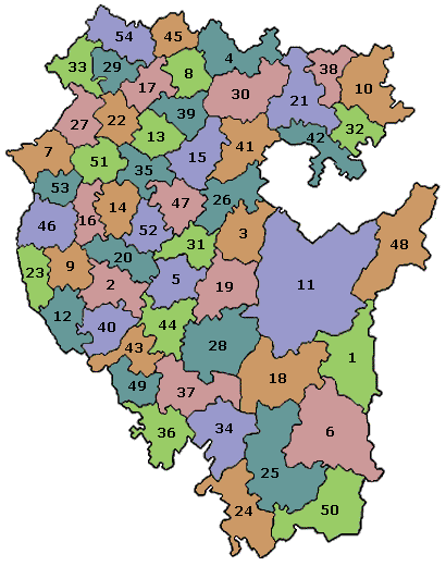 Адм.карта Башкортостана